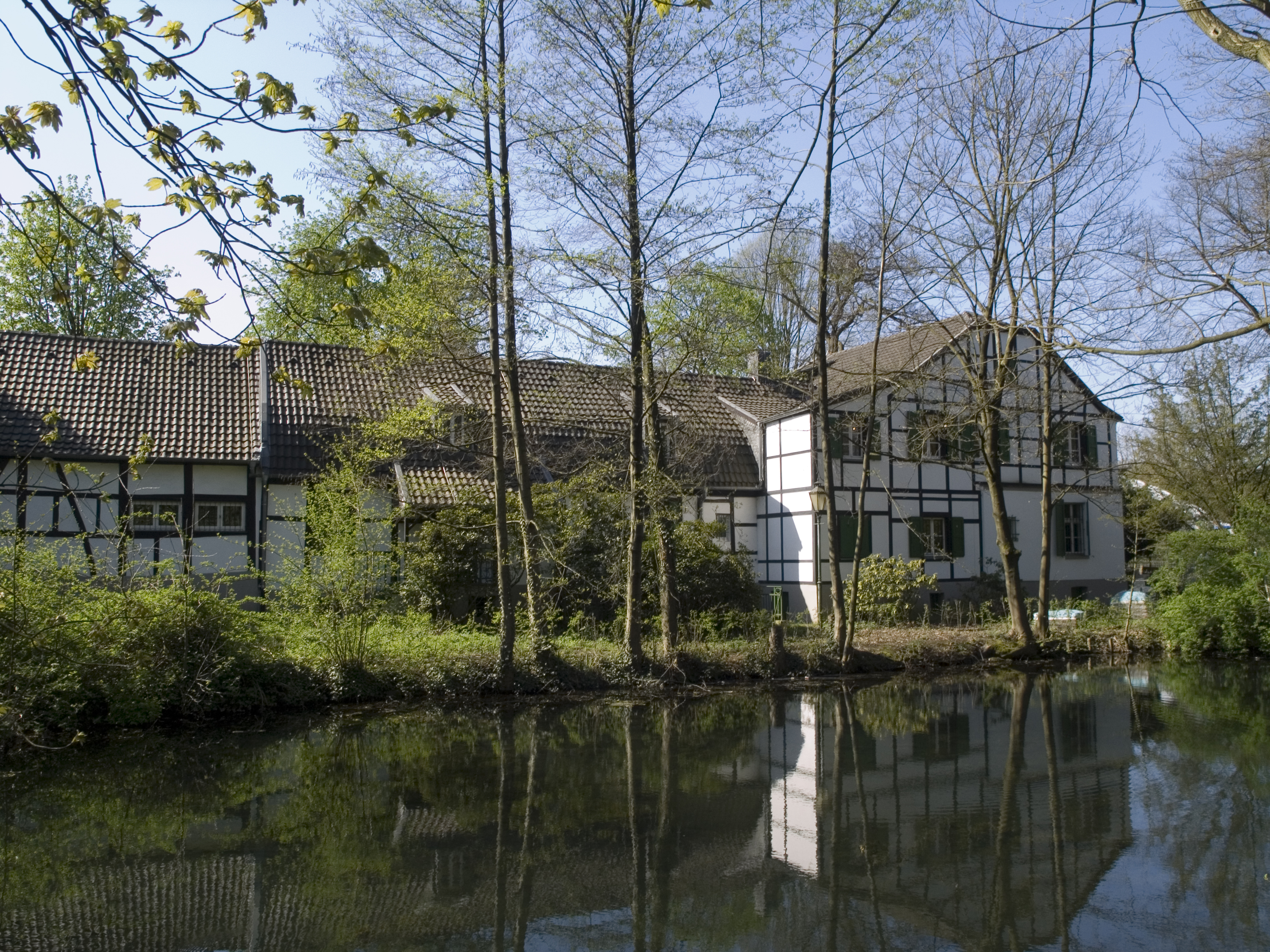 Северный Рейн - Вестфалия, Оберхаузен - Металлургический завод Святого Антония